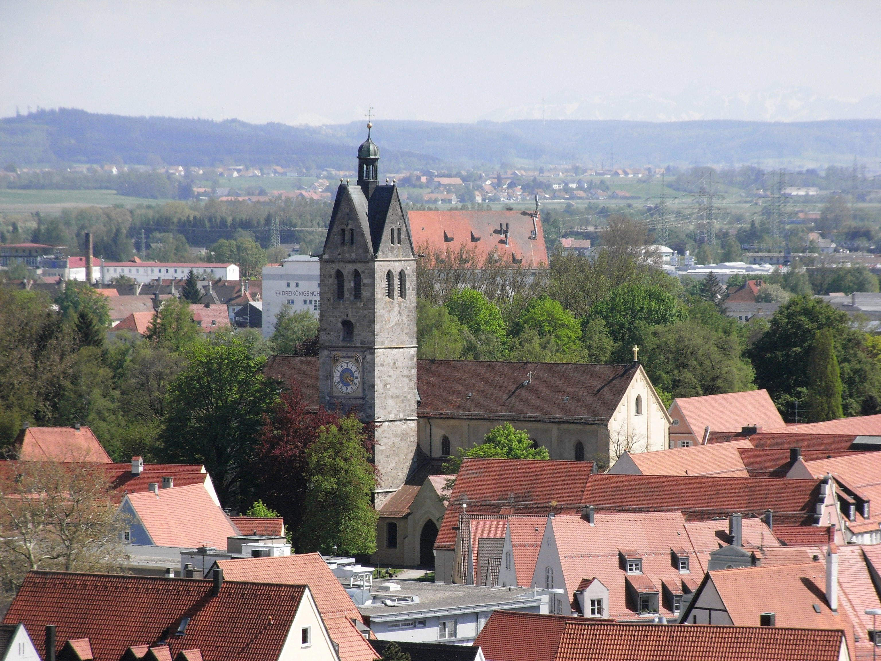 Die Kirche Unser Frauen zu Memmingen vom St. Martinskirchturm aus gesehen